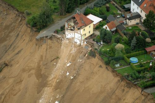 Nachterstedt 18.07.2009 Blick auf die Unglückstelle der eingebrochenen Tagebauseeuferstelle am Concordiasee. Bei einem Erdrutsch ist ein Haus mit drei Bewohnern in dem einstigen Tagebausee versunken. Ein weiteres Mehrfamilienhaus, dessen Bewohner außer Haus waren, wurde ebenfalls zur Hälfte verschüttet.